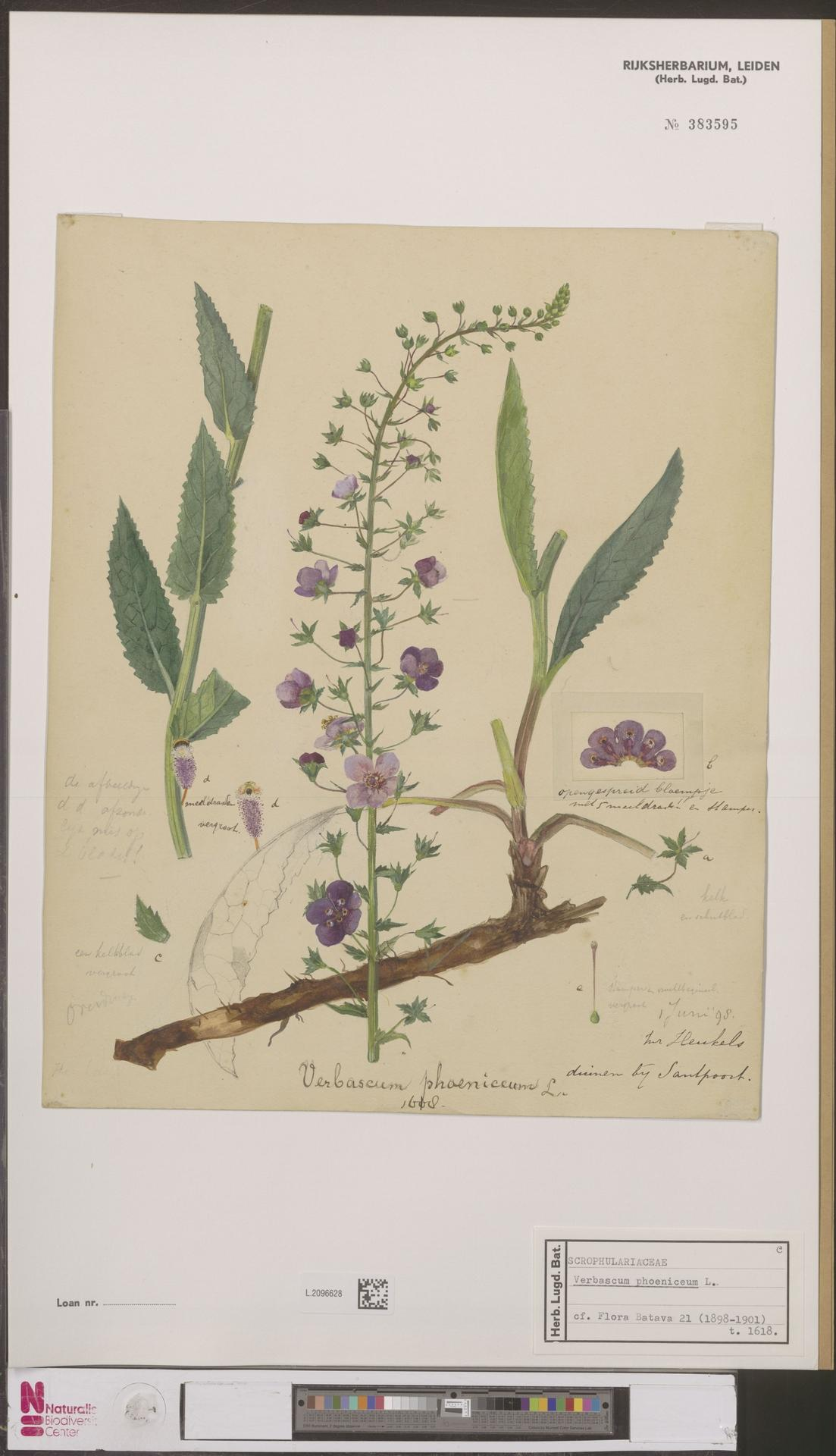 Verbascum phoeniceum Linnaeus